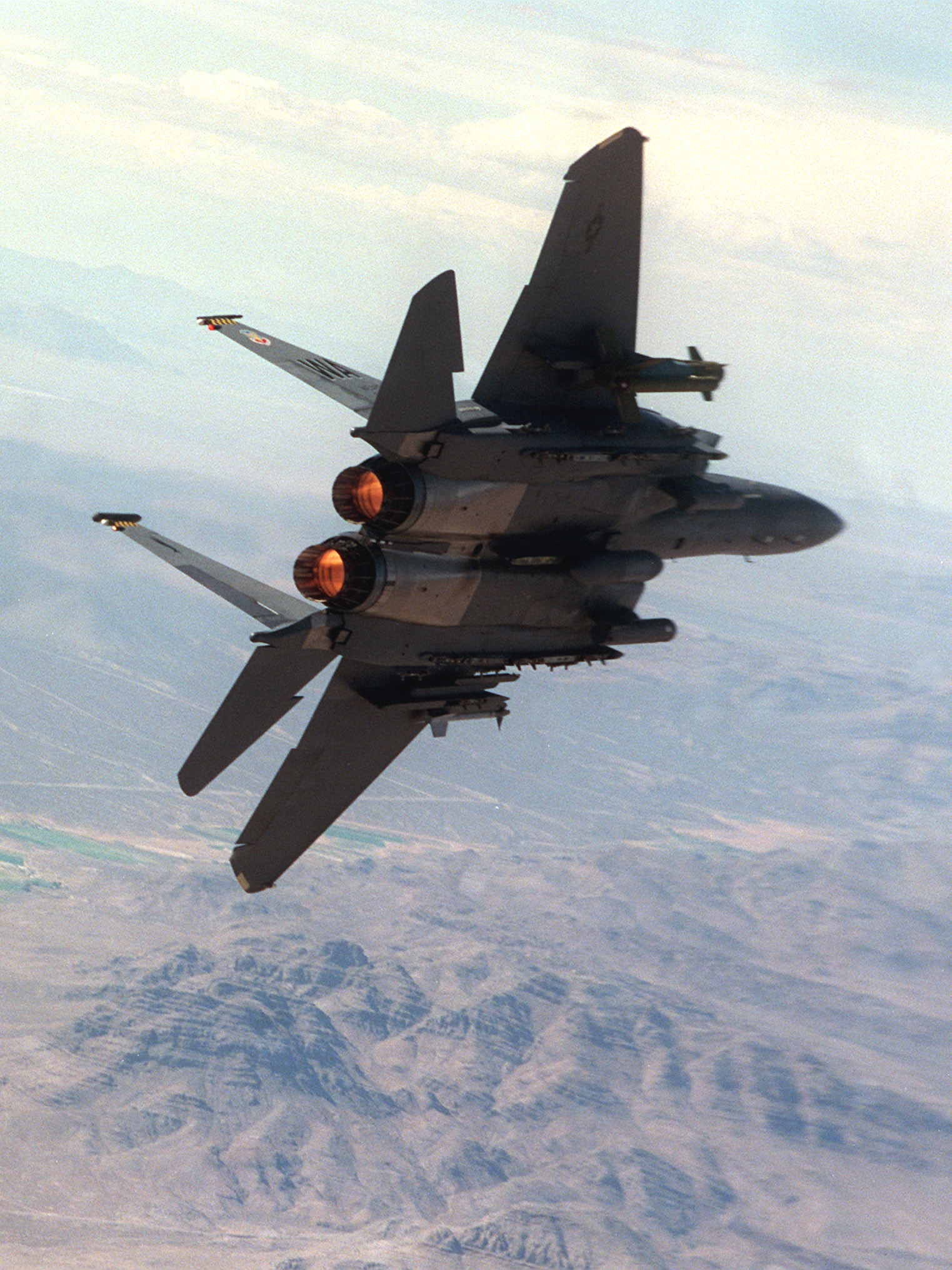 F-15E aft in flight